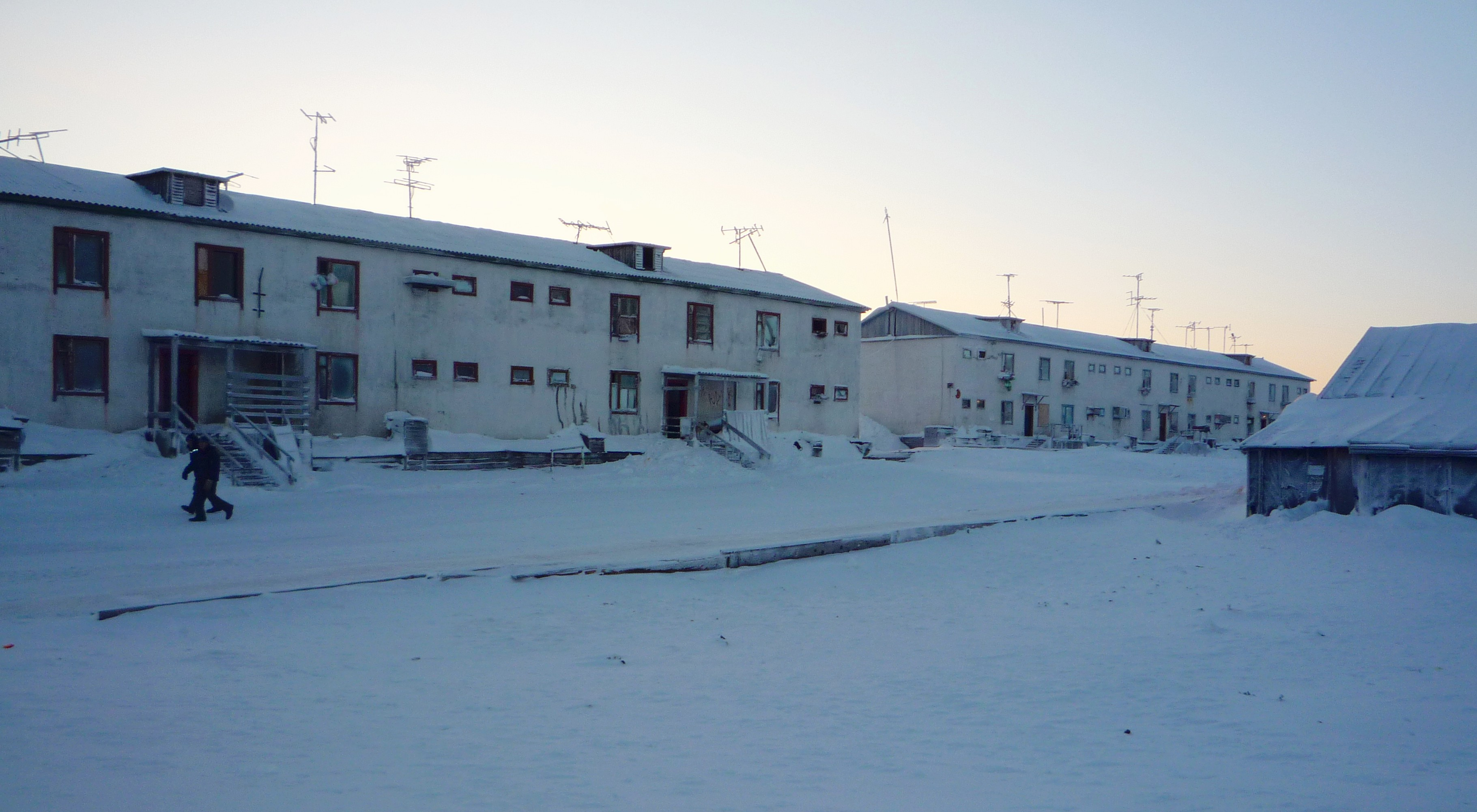 Село Айон